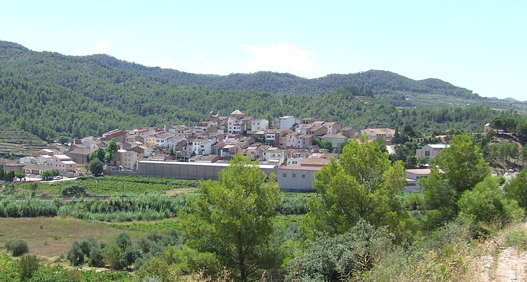 Vista general de la població de Capçanes des de llevant